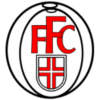 Früheres Wappen des Freiburger FC